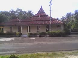 Masjid Jami' Al Huda Babakan Pangandaran